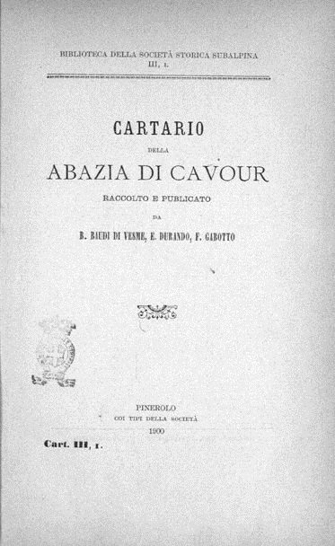 Frontespizio